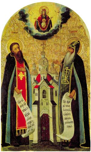 Прападобныя Антоній і Феадосій Пячэрскія. Канец XVII ст., Чарнігаўшчына